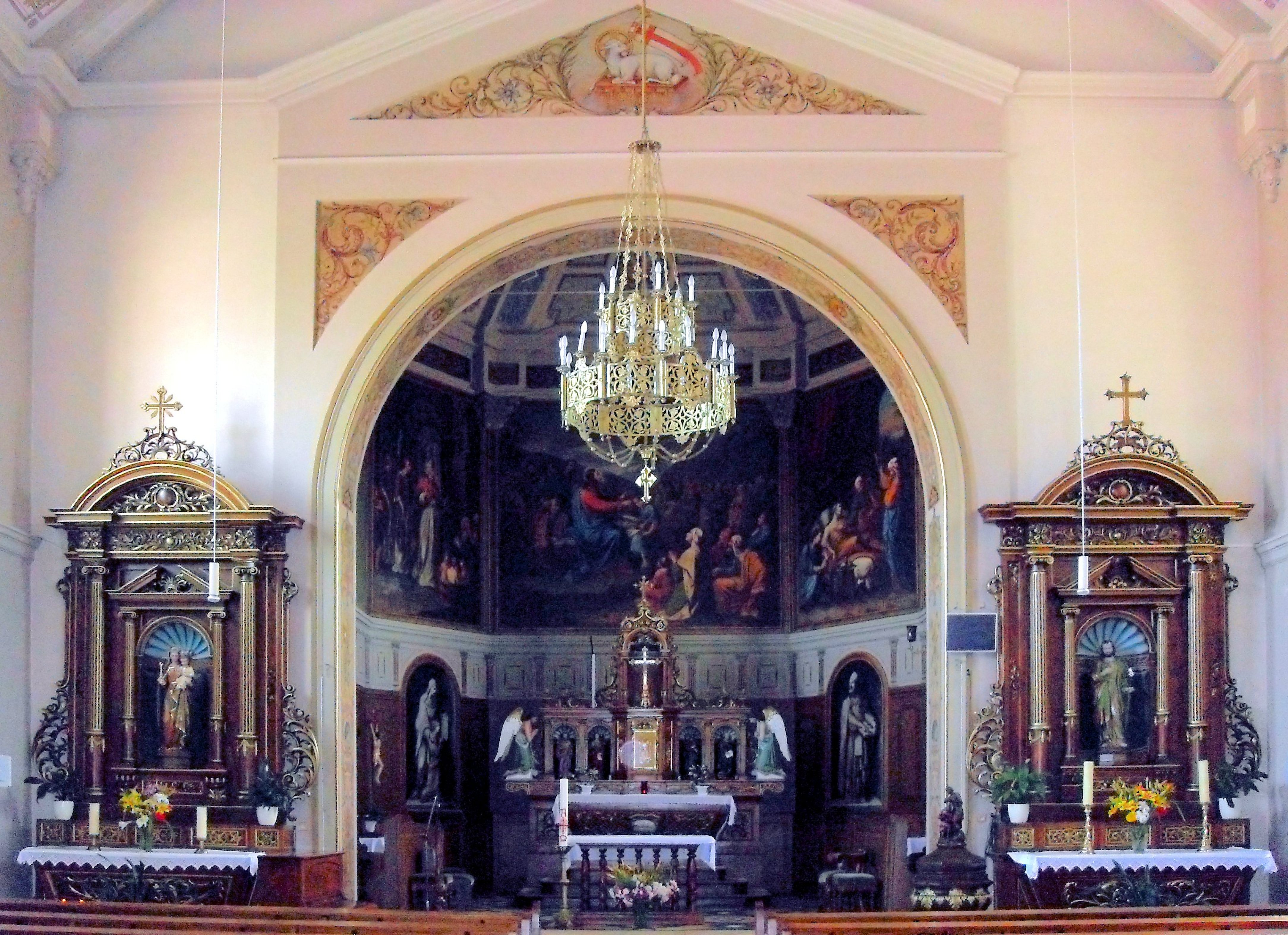 L'intérieur d'église Saint-Nicolas à Balgau